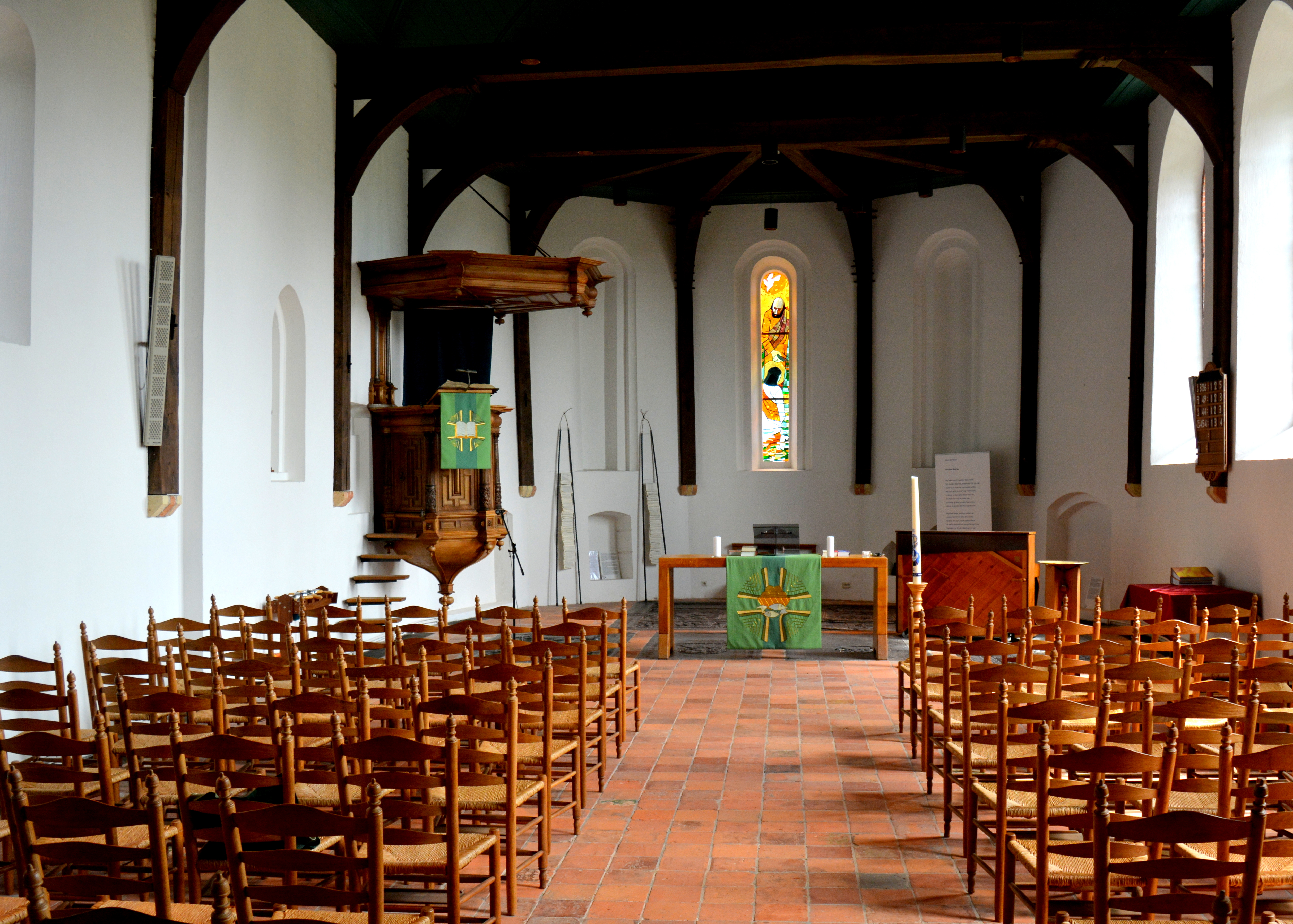 Deinum, Johannes de Doperkerk, interieur